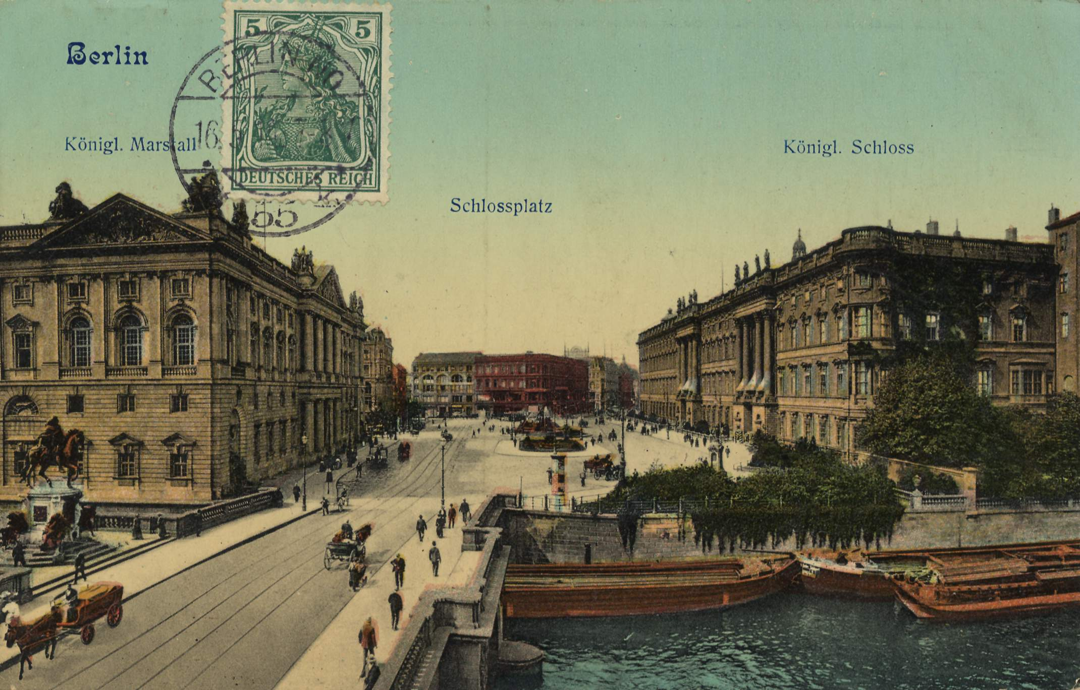 Kgl. Marstall; Schlossplatz; Kgl. Schloss